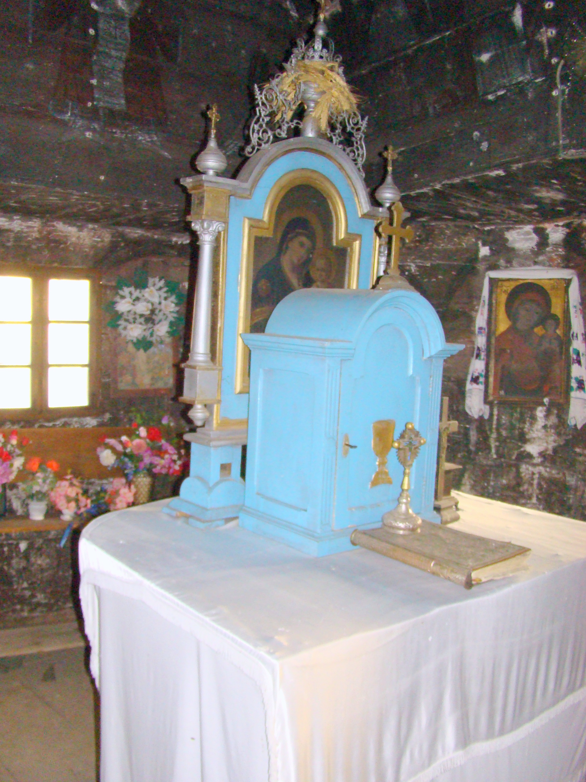 Biserica de lemn "Sfinții Arhangheli Mihail şi Gavriil" din Chieșd, județul Sălaj